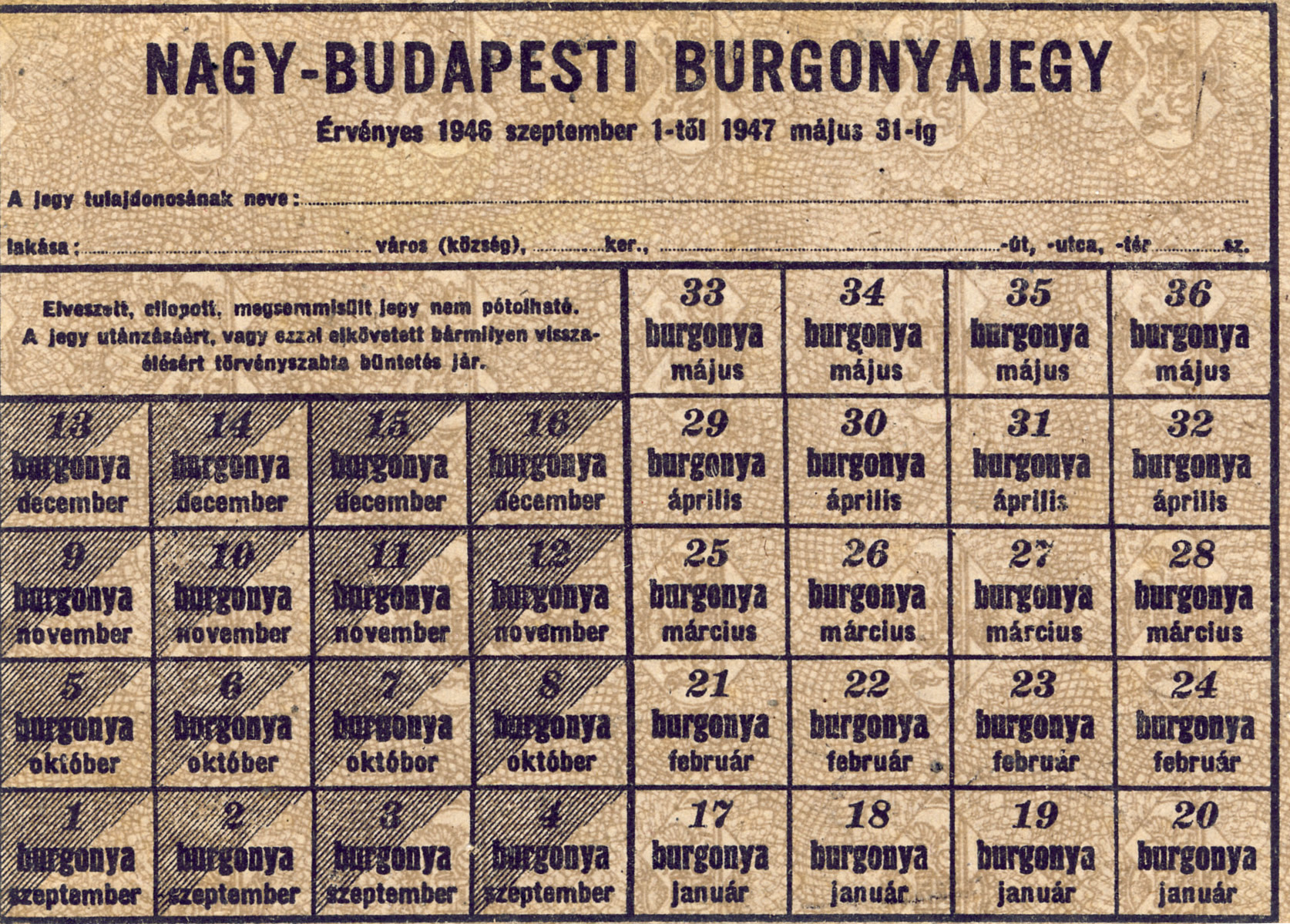 Burgonyajegy 1946 szeptembere